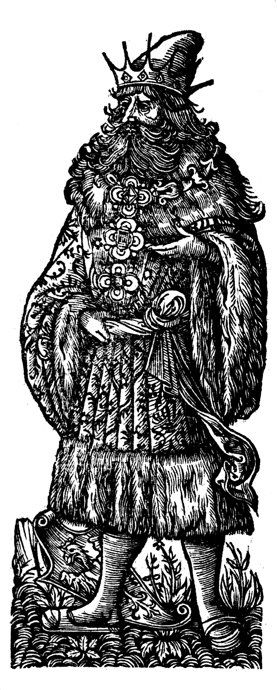 Illustration from Chronica Polonorum. Przedstawiająca Krakusa/Kraka I.